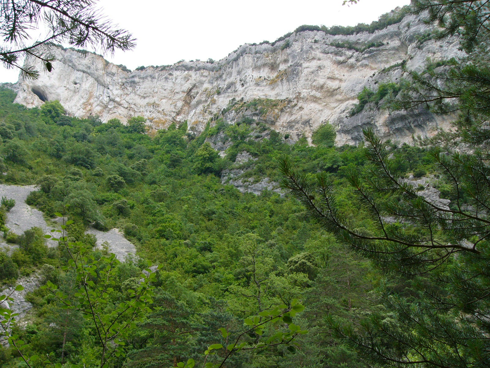 Valderejo Parke Naturala 5 This is a photography of a Site of Community Importance in Spain with the ID: ES2110024. Natura2000 entry, EEA entry